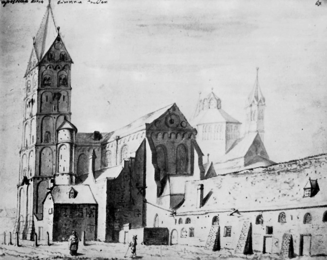 St. Aposteln von Südwesten, im Vordergrund der Westturm und die nach 1200 der Südseite des Langhauses und der Konchenanlage angelehnten Stiftsgebäude. Justus Finkenbaum, Köln 17. Jahrhundert. Das Blatt ist benannt als „s. apostelen kirch binnen coellen“